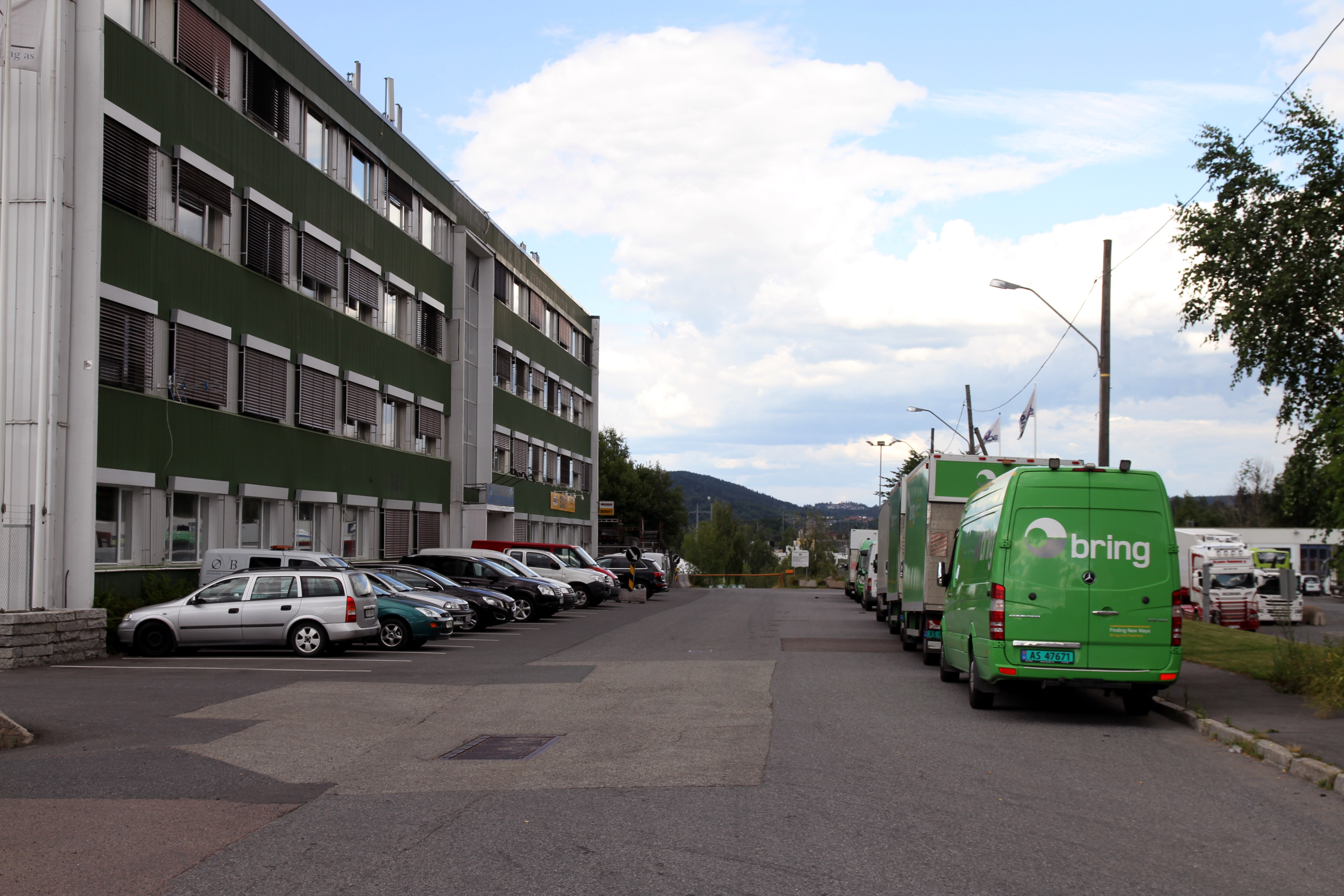 Gamle Leirdalsvei i Oslo.